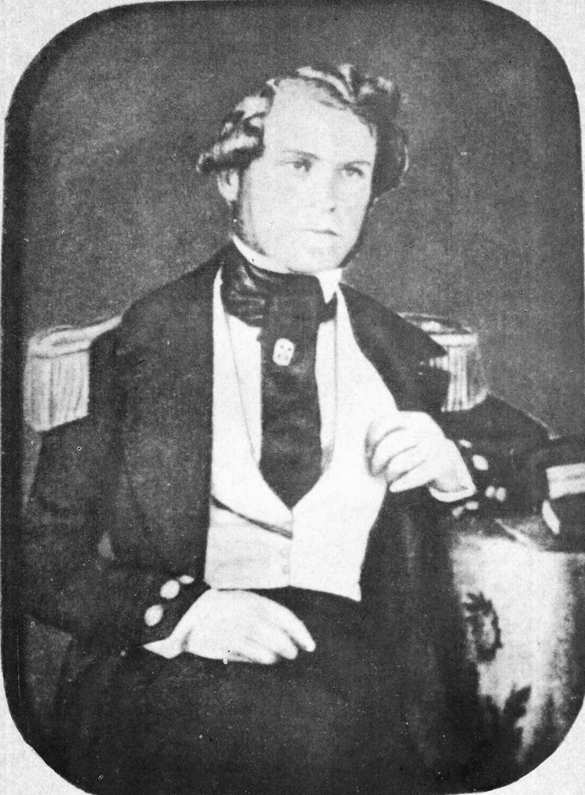 Daguerrotipo de Benjamín Muñoz (Mendoza, 31 de marzo de 1817 – Magallanes, 3 de diciembre de 1851) fue un militar y político chileno. Hijo de don Florencio Muñoz y doña Paula Gamero. Ingresó a la Academia Militar en 1834 y en 1838 fue guardiamarina. Actualmente la plaza de armas de la ciudad de Punta Arenas lleva su nombre.